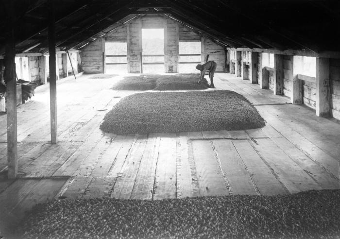 Negatief. Nadrogen van cacao op de zolder van Susanna's daal